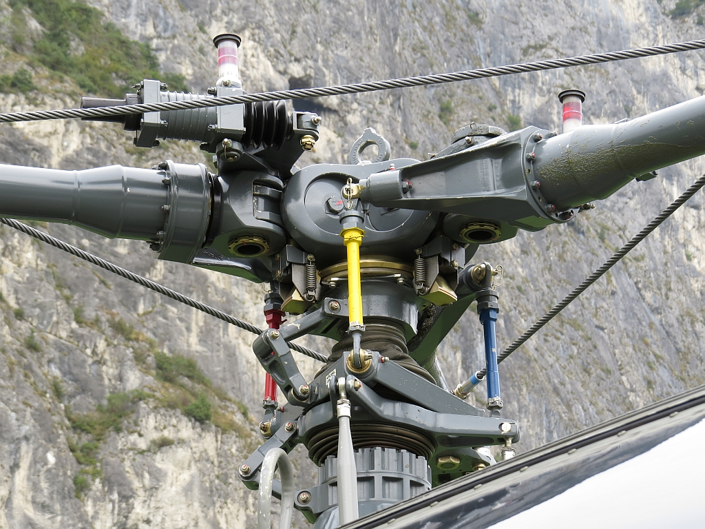 Aérospatiale SA-319 Alouette III Rotorkopf